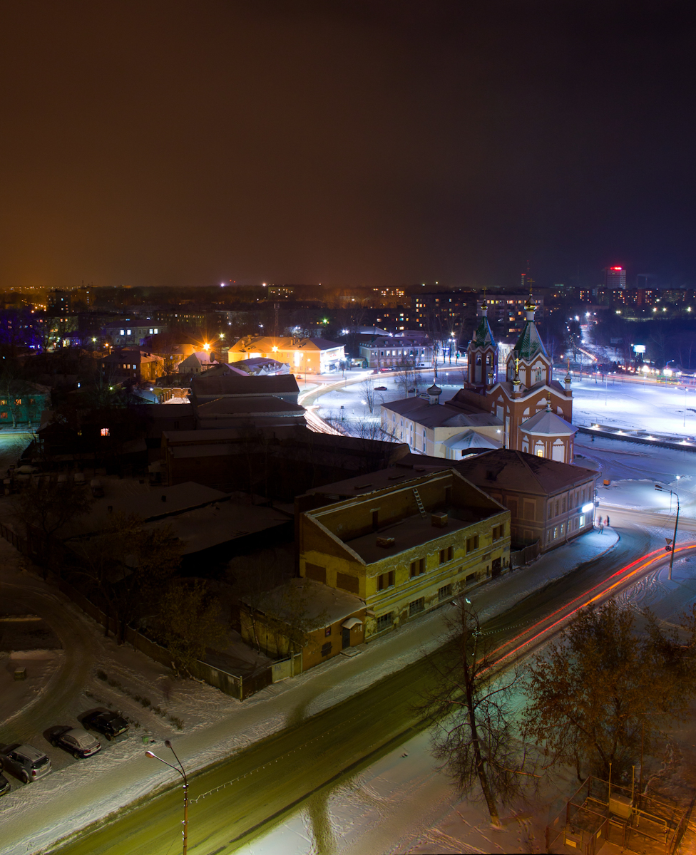 Свобода.Глазов